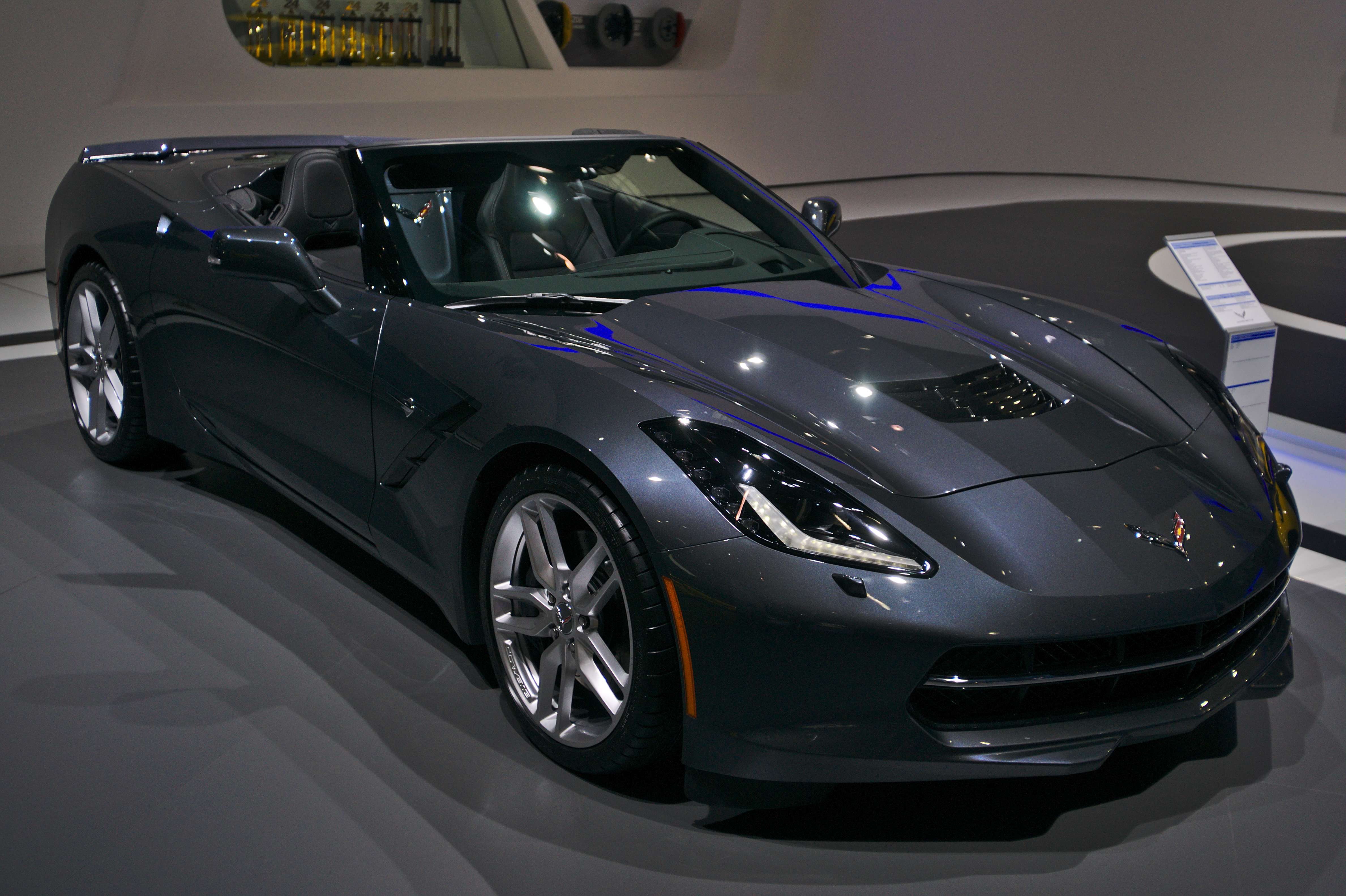 Salon de l'auto de Genève 2014 - 20140305 - Chevrolet Corvette C7 Stingray convertible